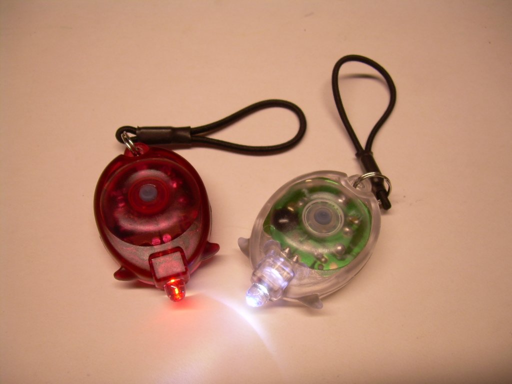 Bike lights